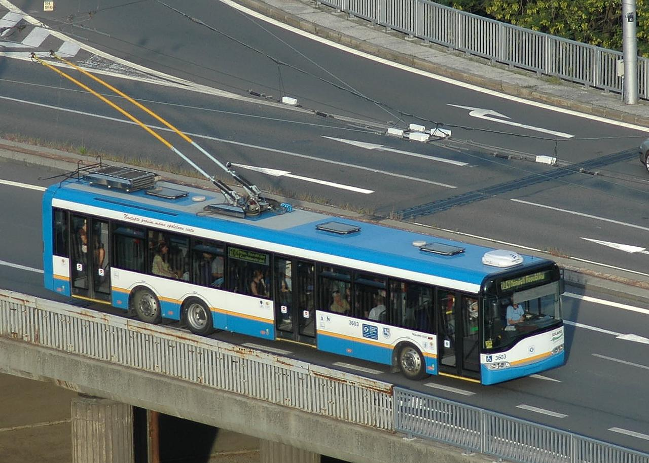 Trolejbus Solaris Trollino 15AC, Most Pionýrů, Slezská Ostrava